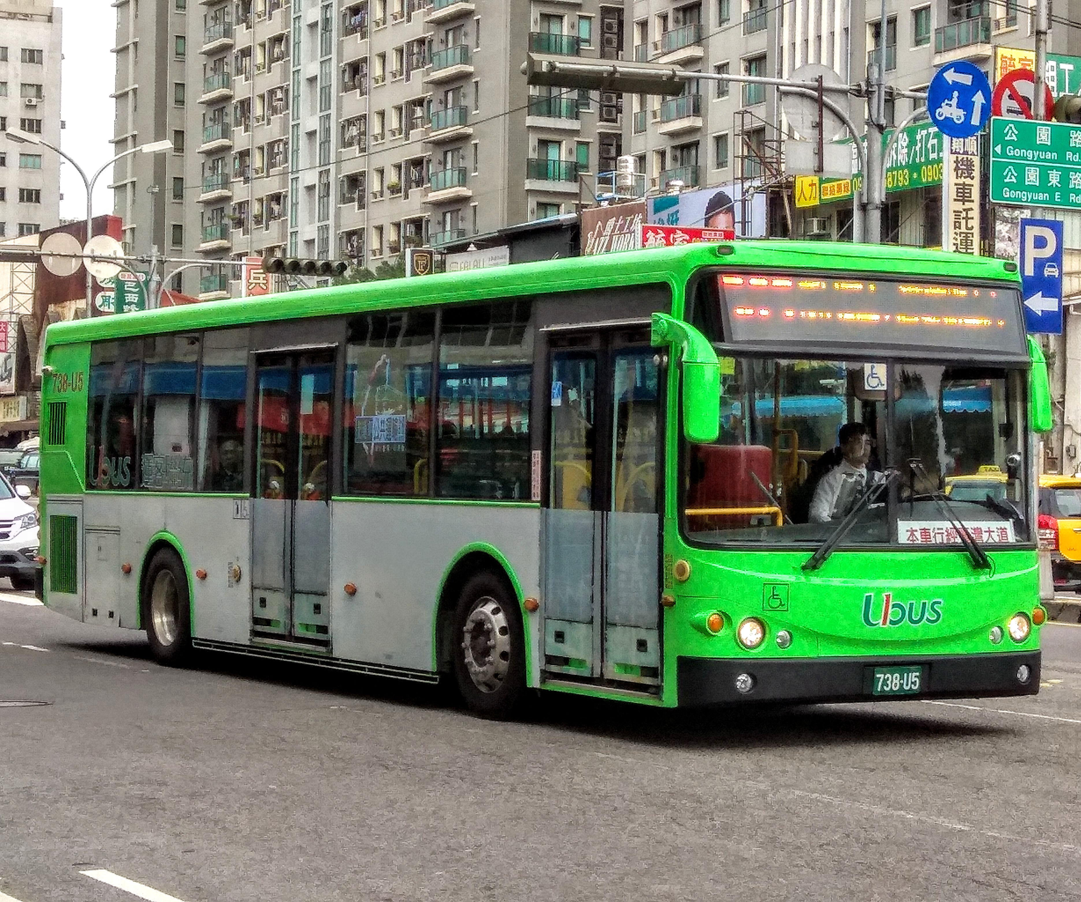 統聯客運 中興金龍KL6112U1大客車 738-U5